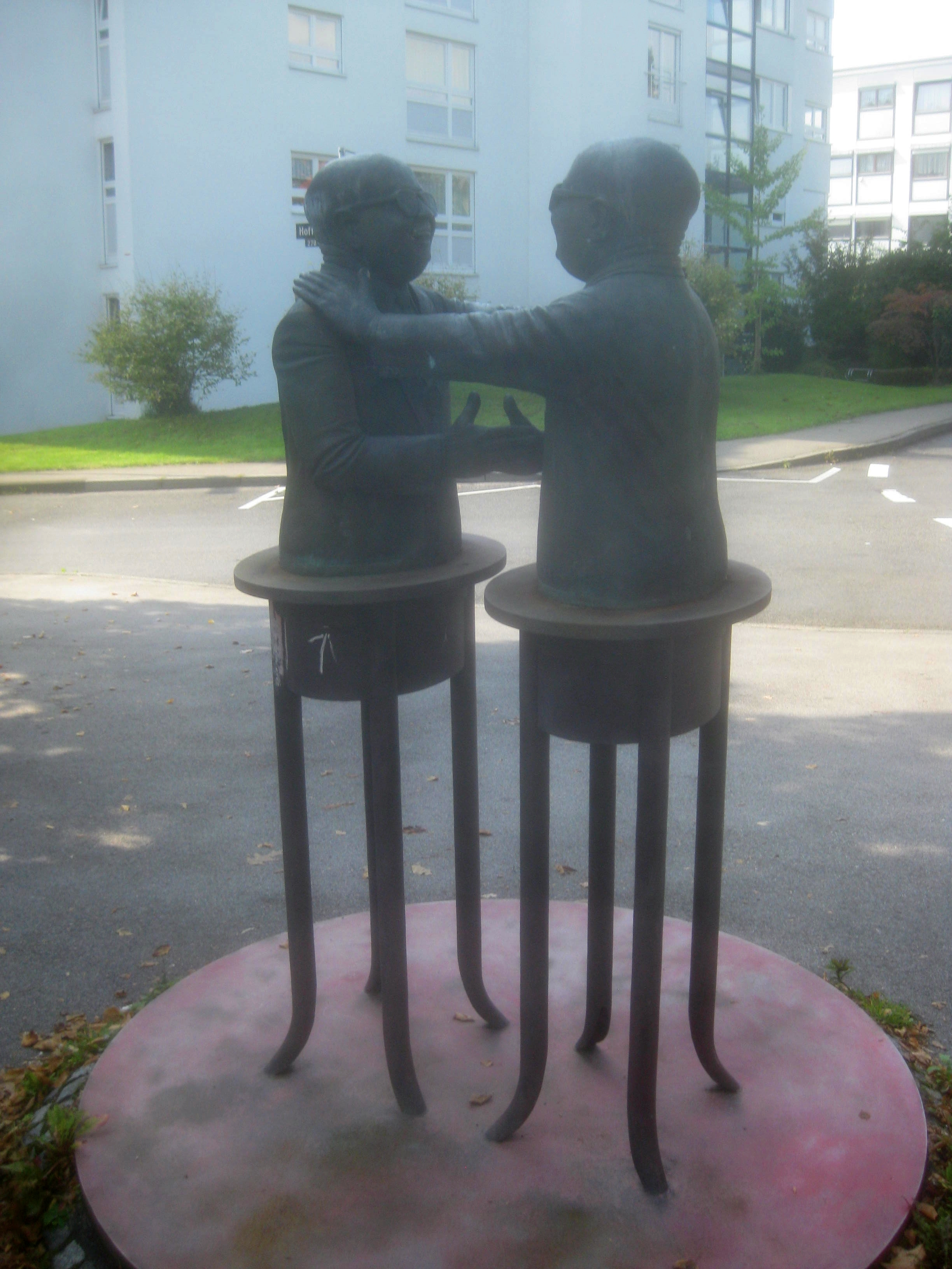 Manus manum lavat , Skulptur von Guido Messer, Bronze, Eisentische, Farbe, 1986, Stuttgart-Degerloch, Hoffeldstraße 215, Lothar-Christmann-Haus.